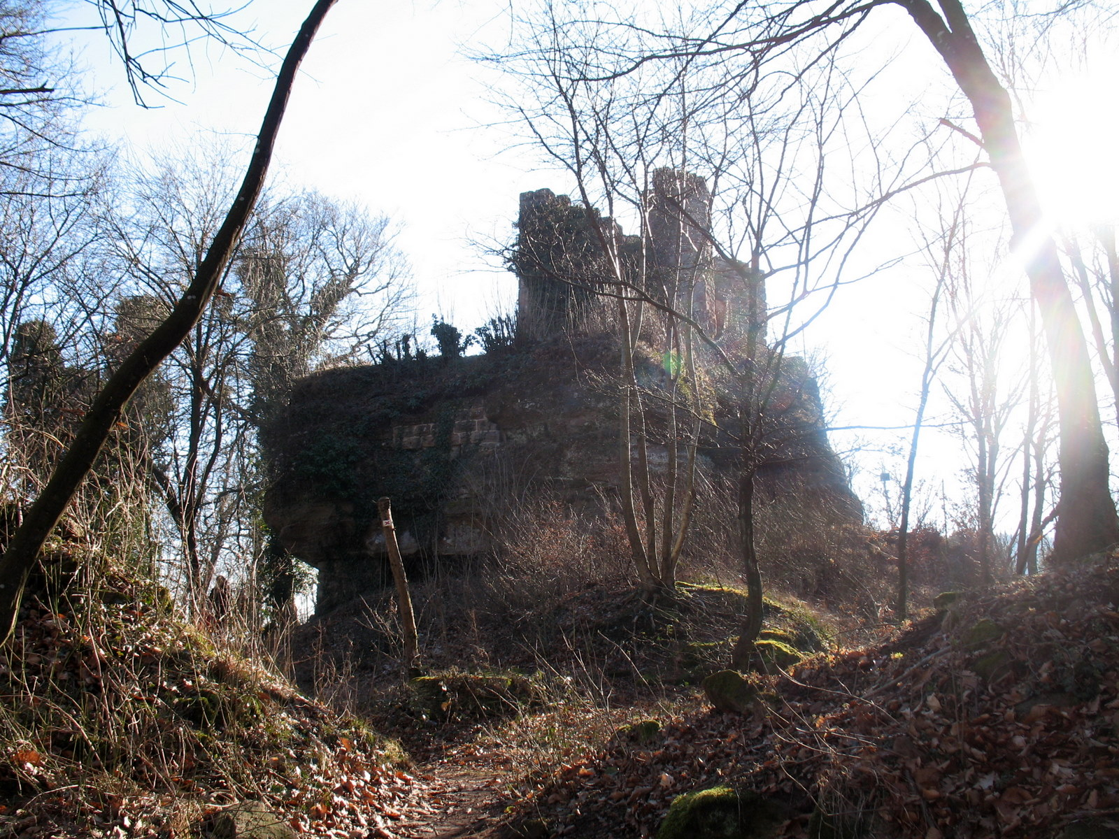 Château du Petit-GeroldseckIMG_5821